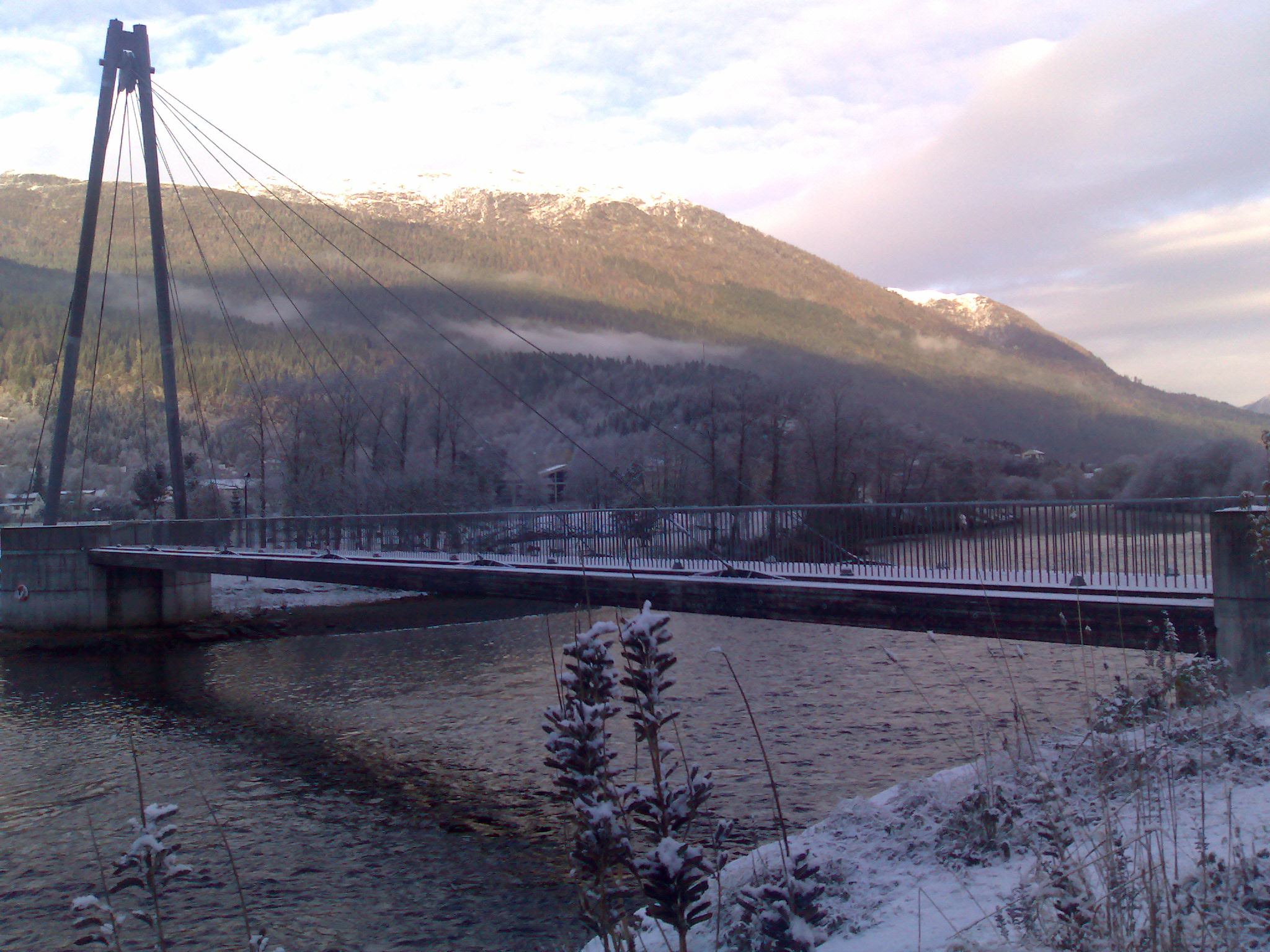 Hafstadbrua in Wikipedia:Førde. Michael Shanks 02.Nov.2006